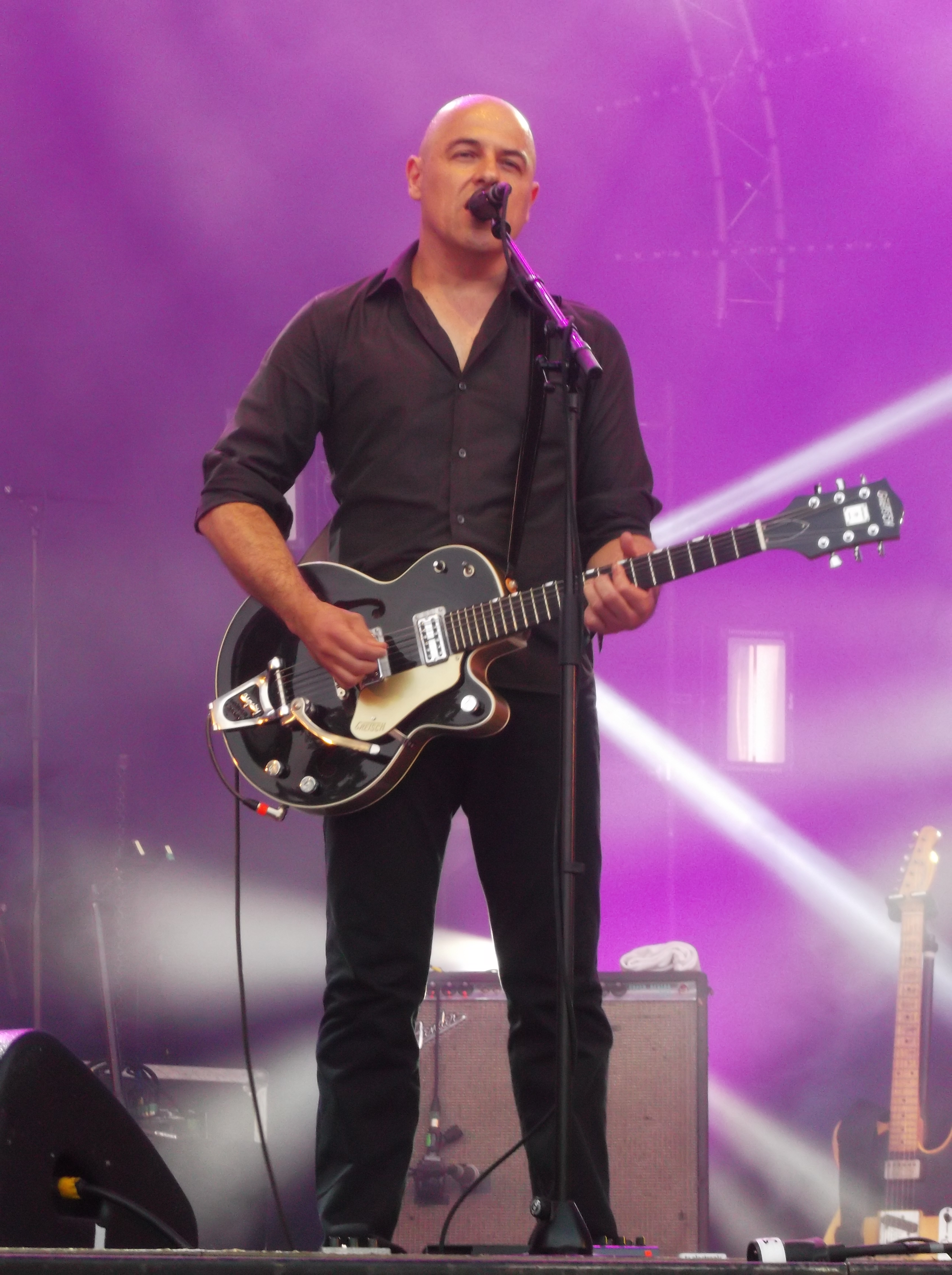 Dominique A au Festival Beauregard 2015, à Hérouville-Saint-Clair, le 3 juillet 2015.